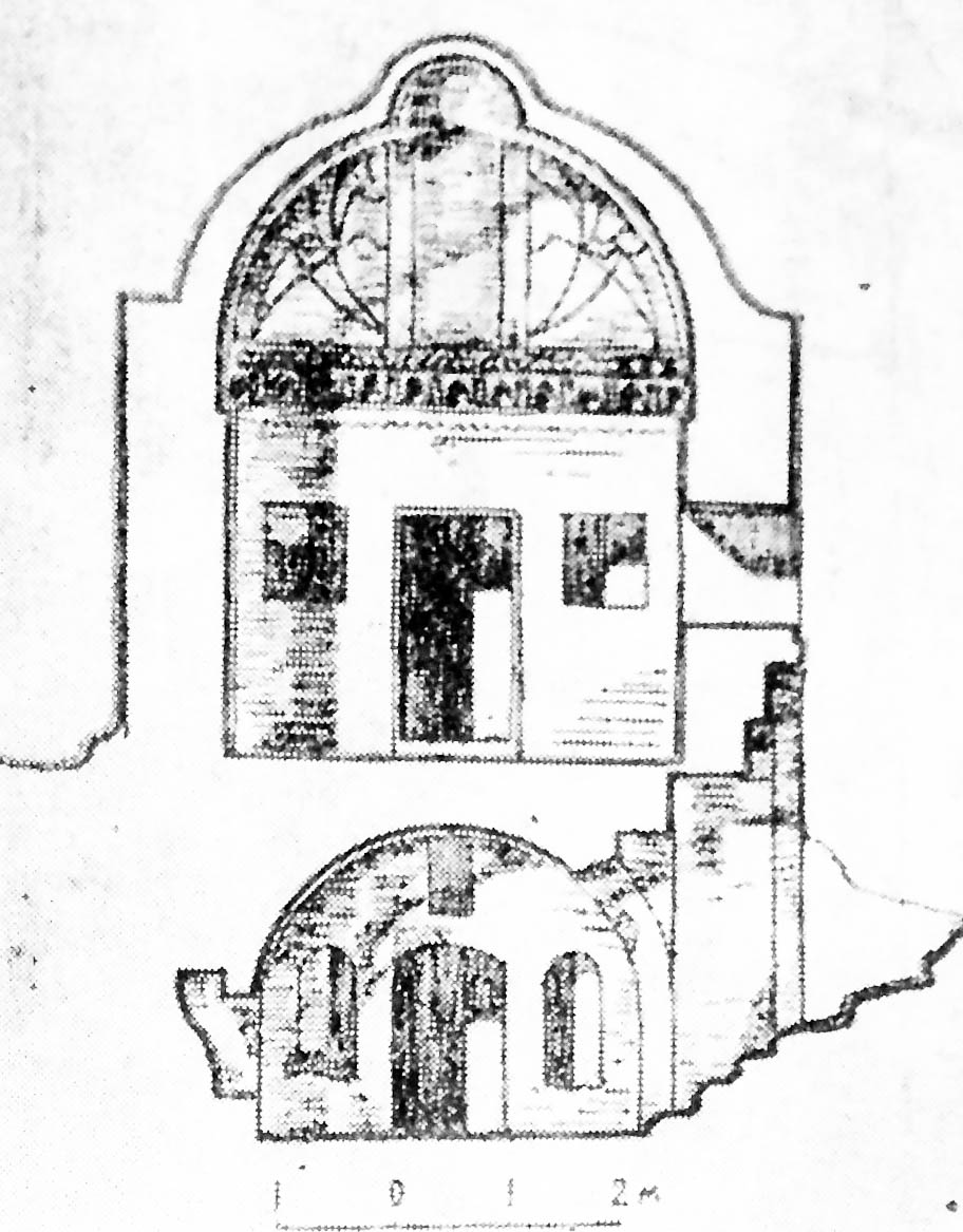 Gəncə şəhəri Şəddadilər küçəsi 24 A ünvanındakı günbəzli evin kəsimi